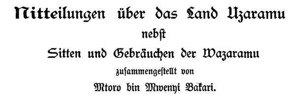 Mtoro bin Mwinyi Bakari: Mitteilungen über das Land Uzaramu nebst Sitten und Gebräuchen der Wazaramu, Titel